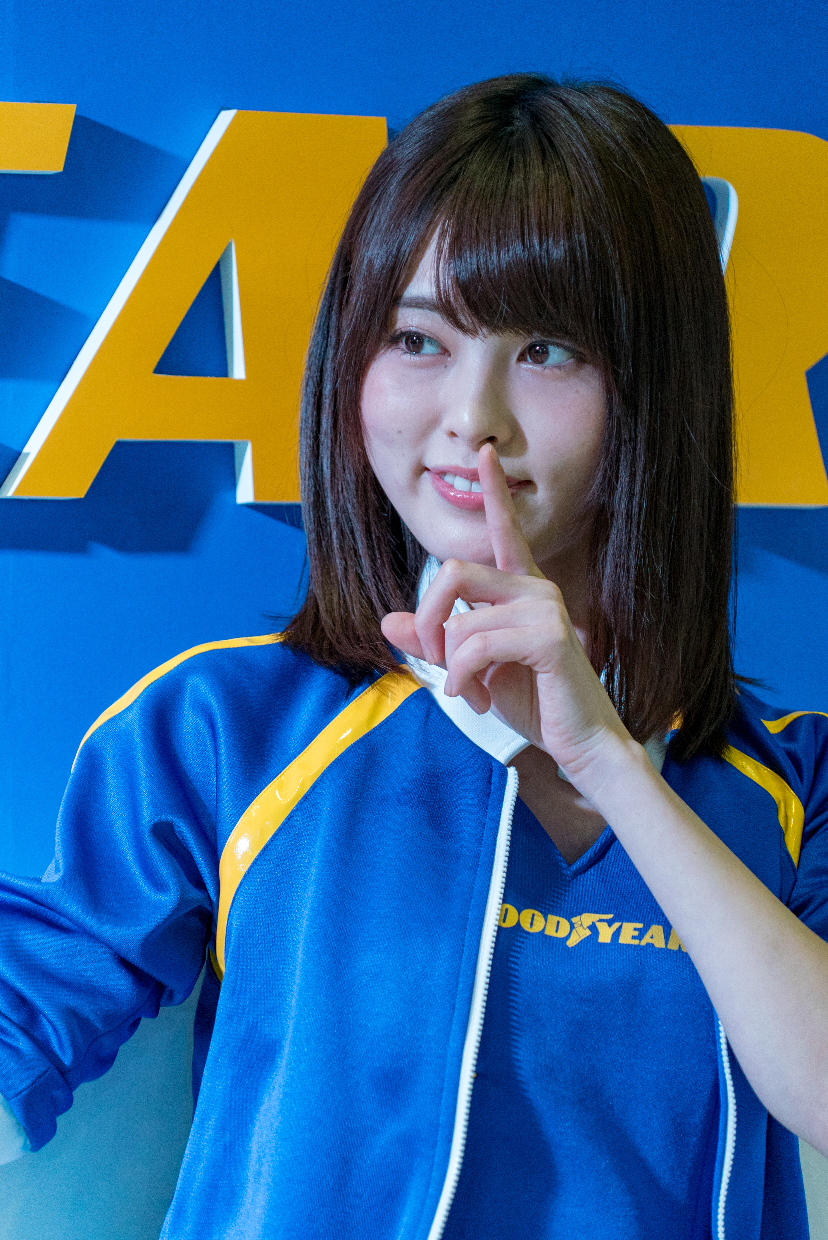 TOKYO AUTO SALON 2018-2.jpg